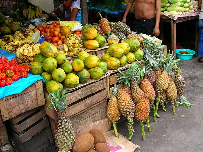 market stand in Belen , Iquitos , by Yuval Gelber